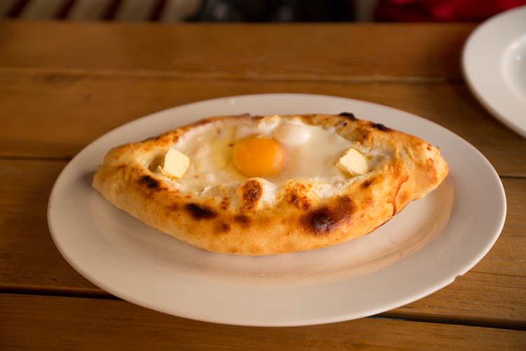 FV7A0603.jpg